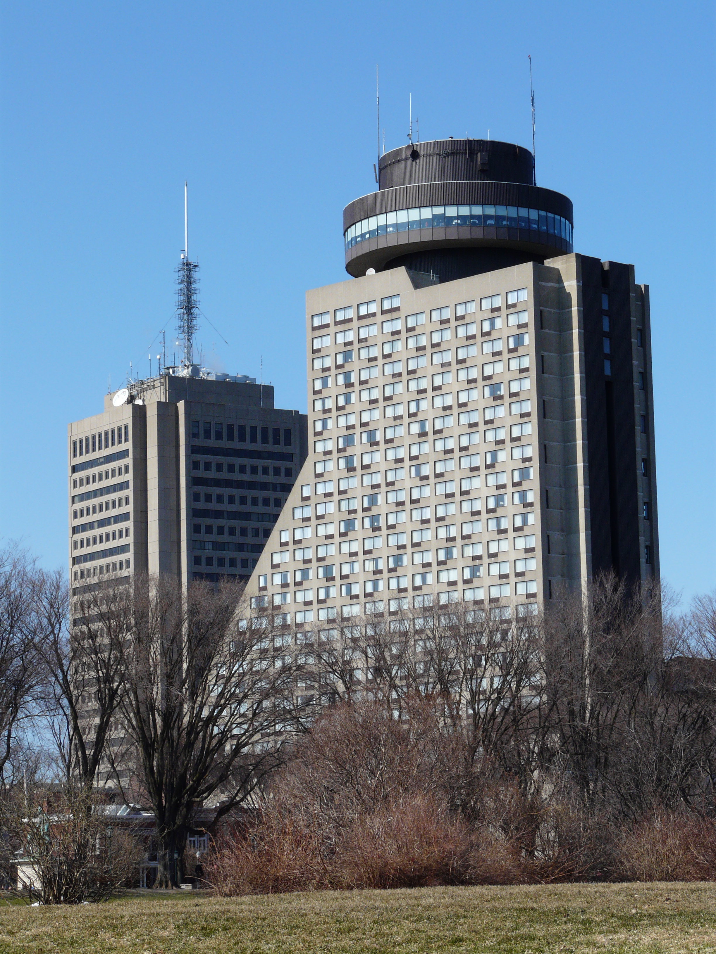 Hôtel Le Concorde.